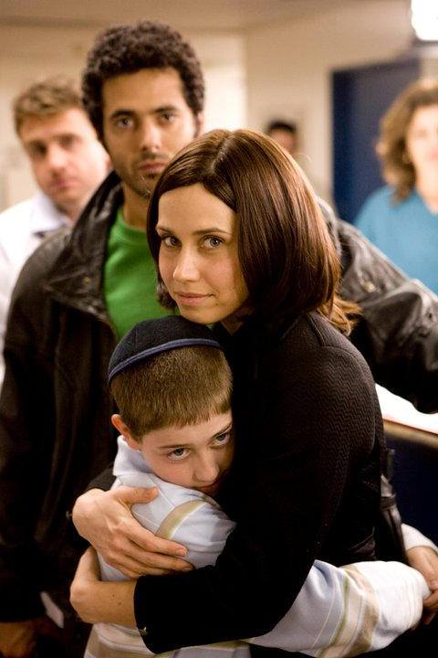 ליאת אזר בסדרה סימני שאלה